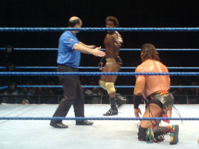 Orlando Jordasn vs Tatanka in Stuttgart